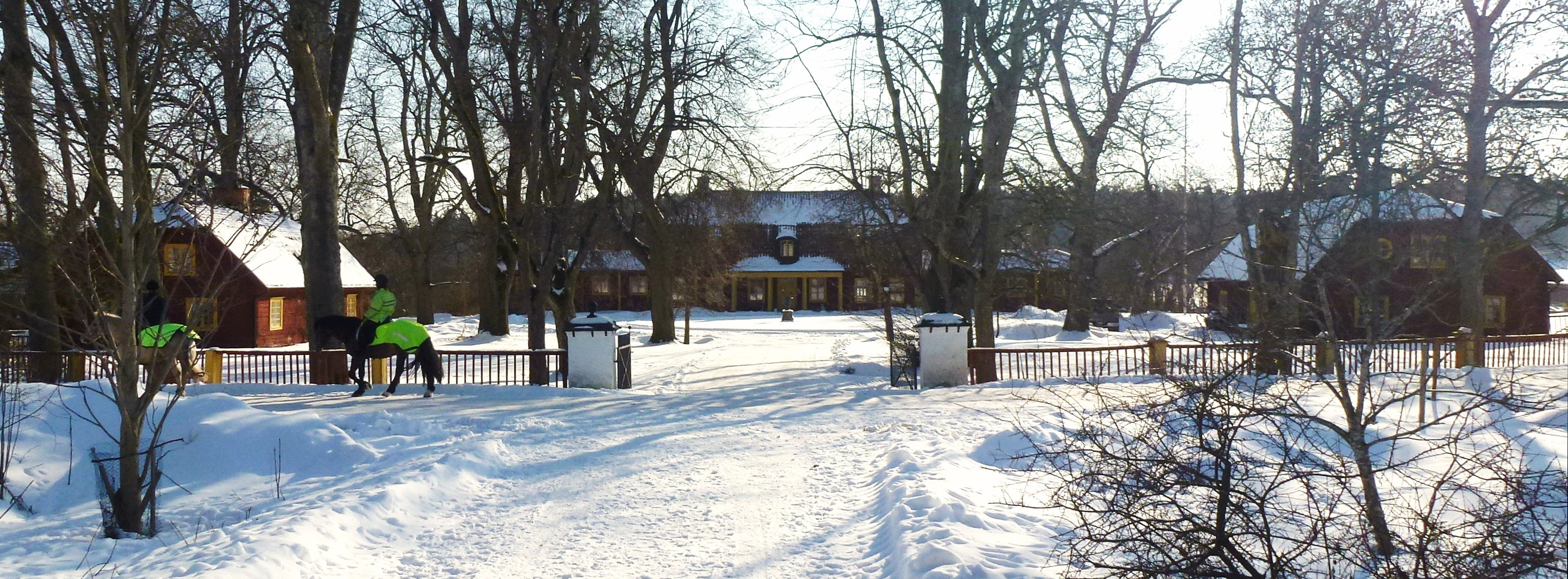 Elvesta gård huvudfasad mot norr